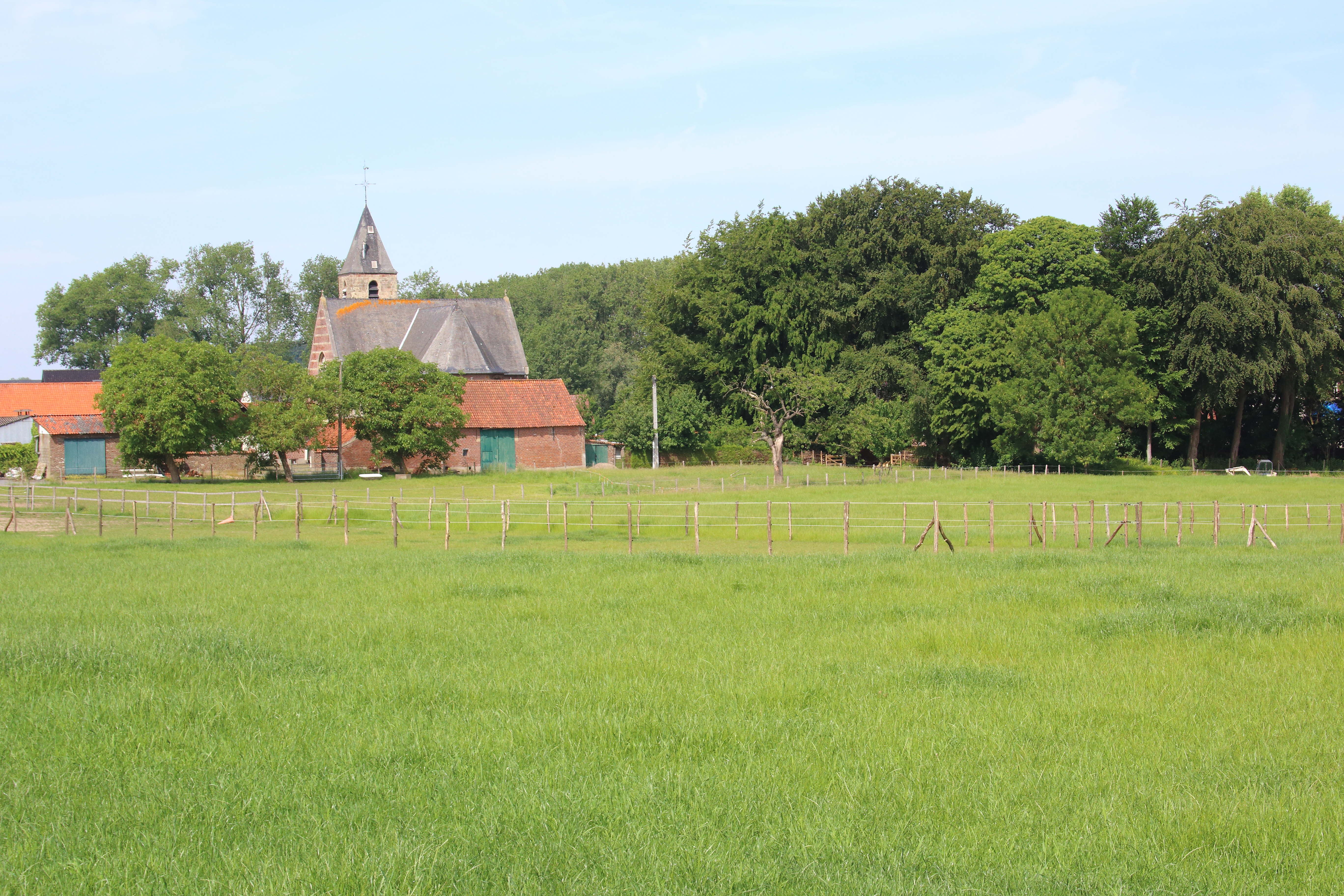 Oombergen, Zottegem, Vlaanderen, België